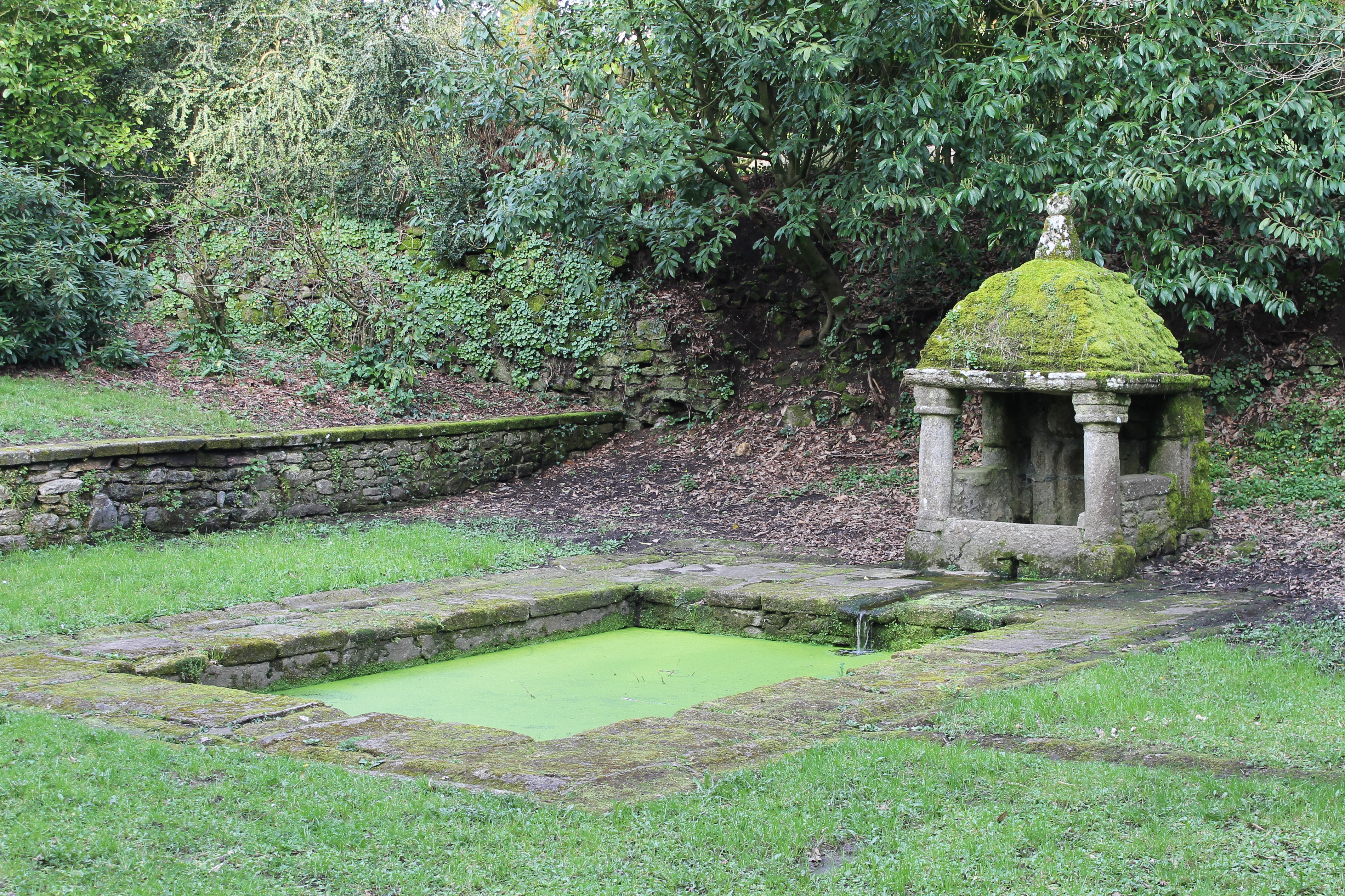 Fontaine Saint-Martin (XVIe siècle) à Questembert (Morbihan).